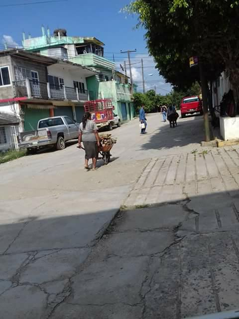 Gente en el Municipio de Jesus Carranza Veracruz Mexico